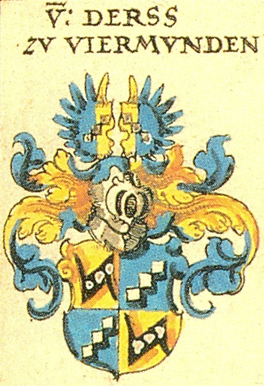 Johann Siebmacher: New Wappenbuch eingescannt aus: Horst Appuhn (Hrsg.), Johann Siebmachers Wappenbuch. Die bibliophilen Taschenbücher 538, 2. verb. Aufl , Dortmund 1989 Hessische Blatt 140